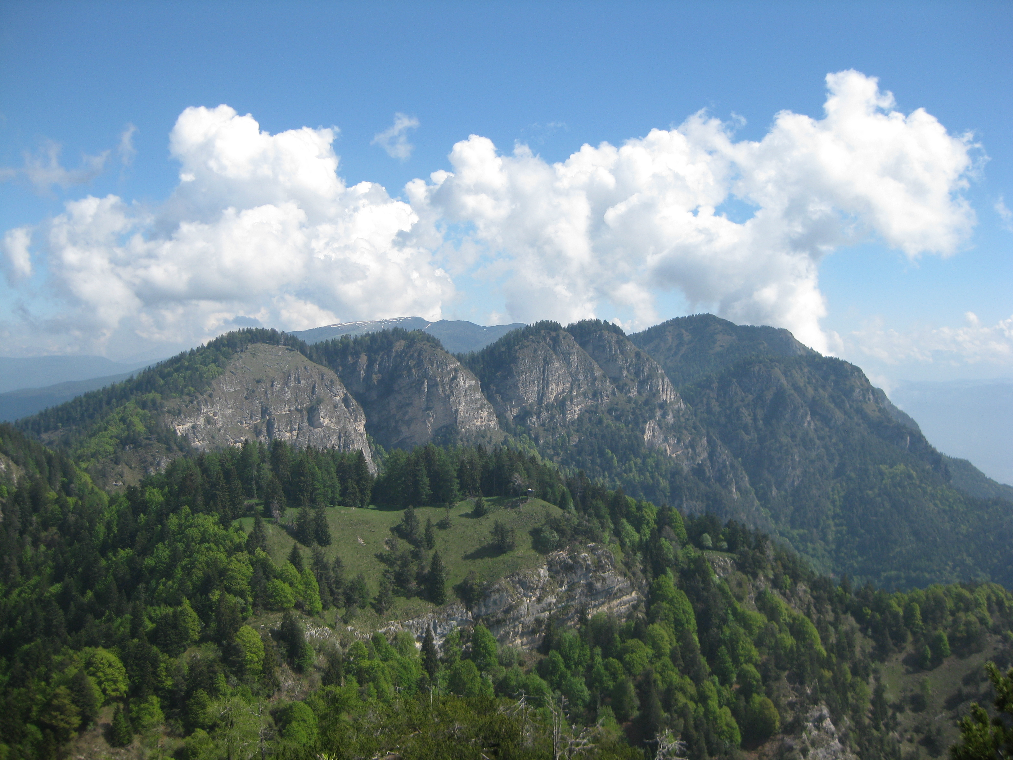 Das Tresner Horn (Corno di Tres) von Südwesten gesehen: Der Gipfel des Tresner Horns überragt kaum die umliegenden Erhebungen des Mendelkamms